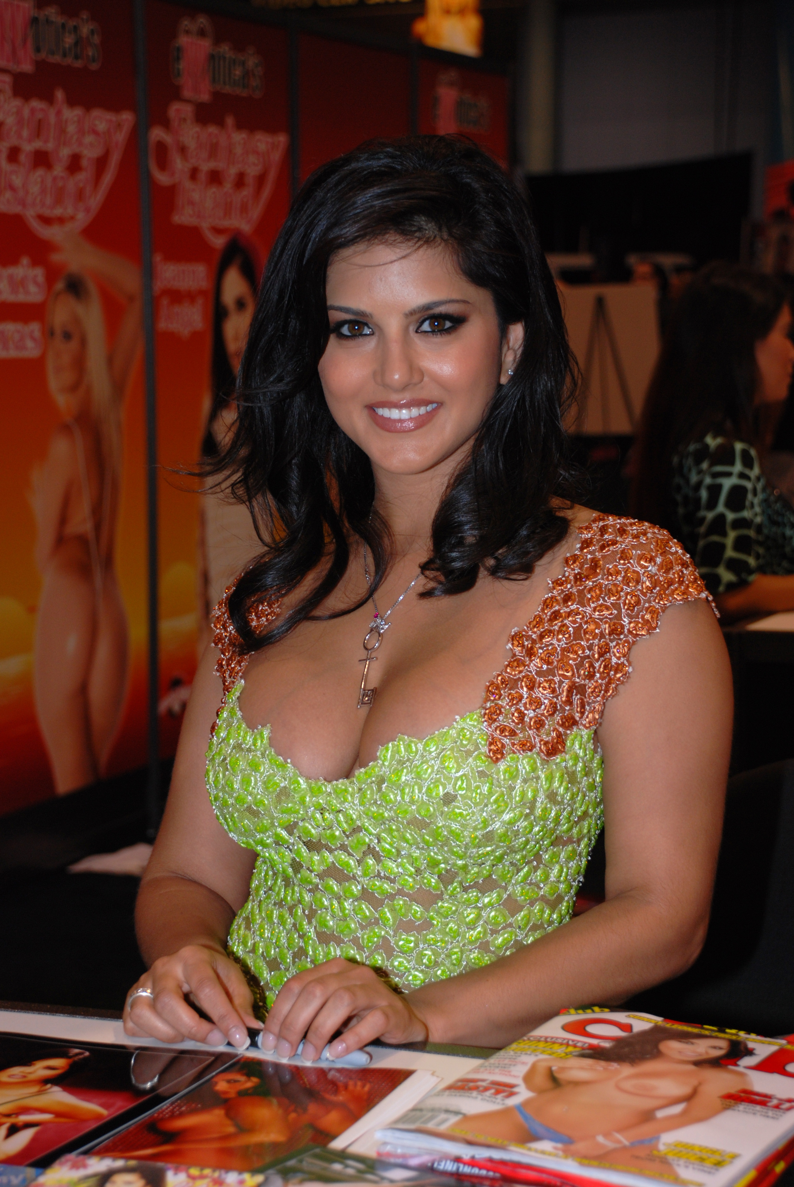 Sunny Leone at Exxxotica 2009 Miami